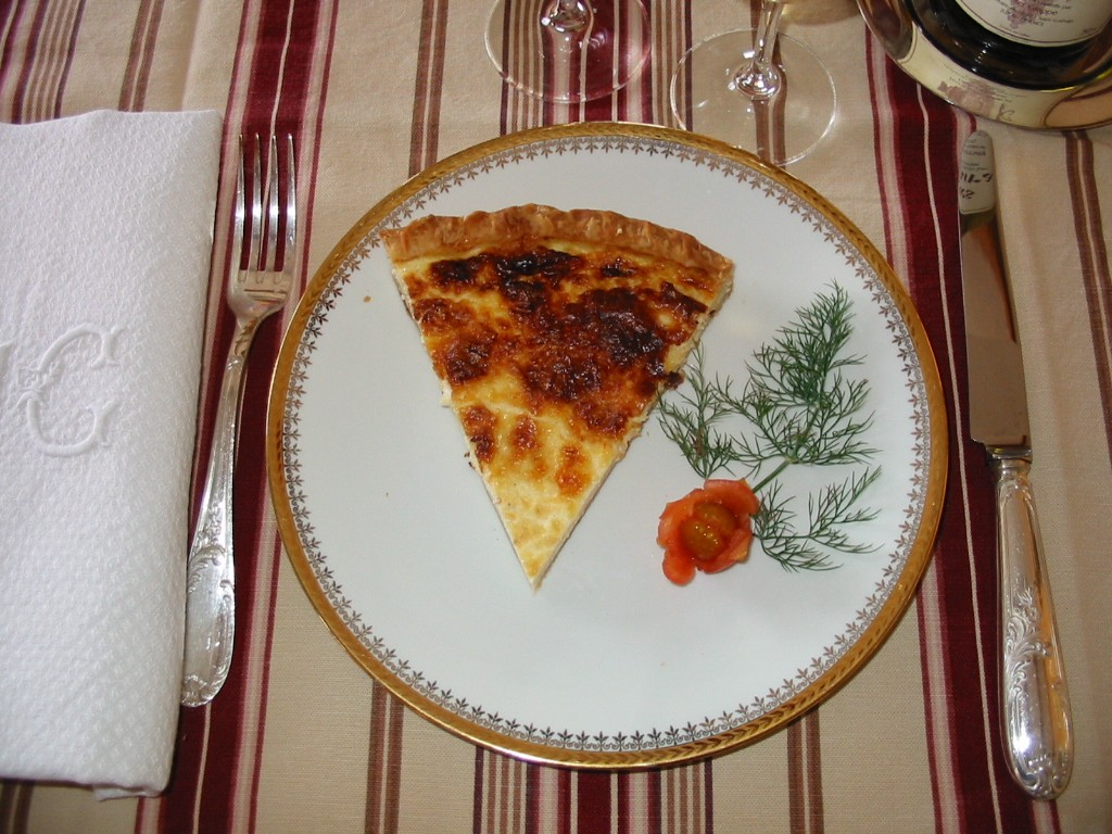 Tarte au Comté